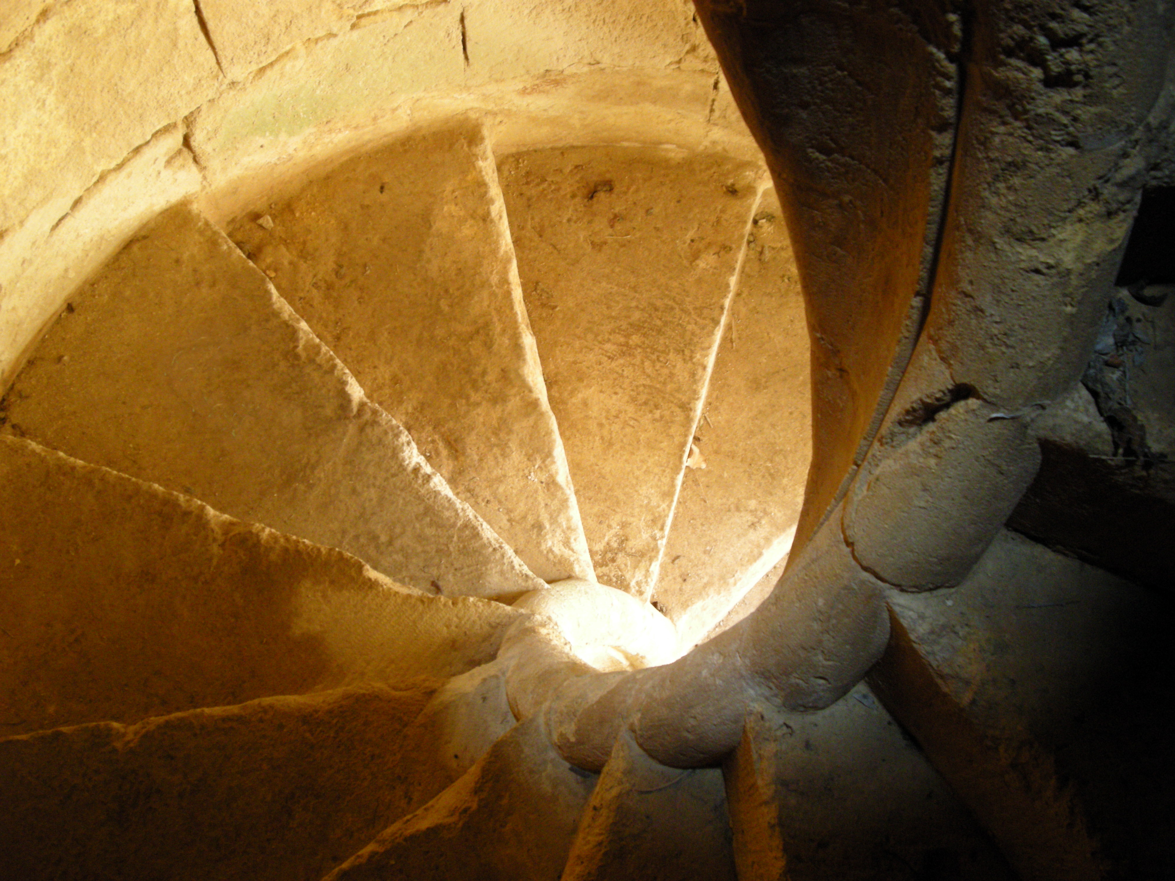 Escalera sin alma, cercana al claustro.